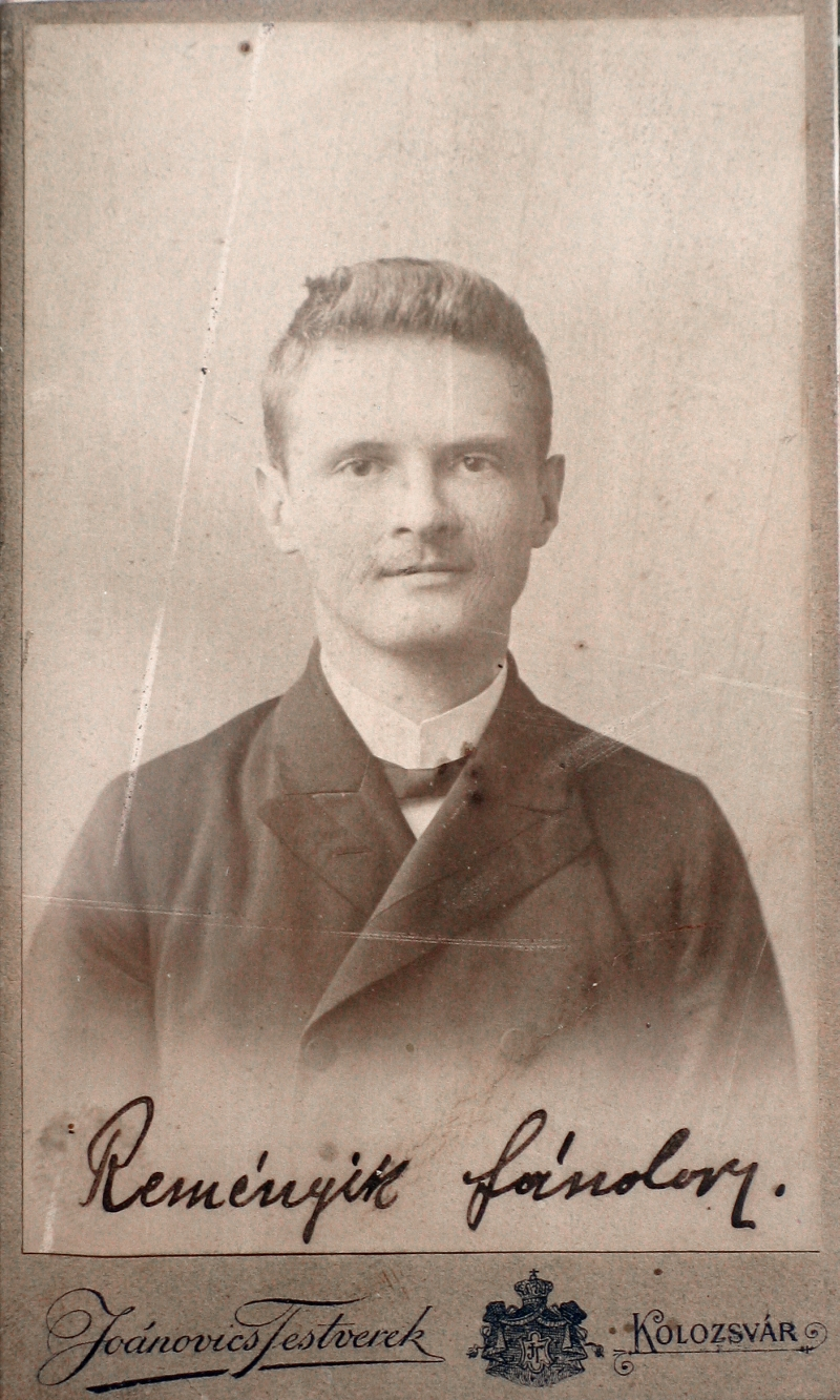 Reményik Sándor költő portréja